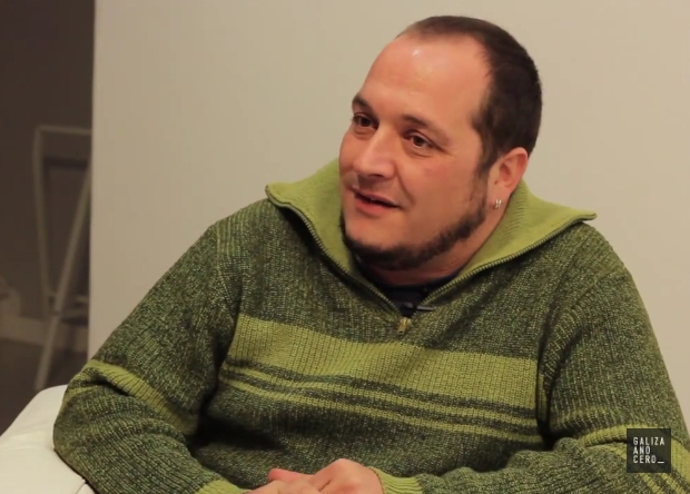 David Fernández